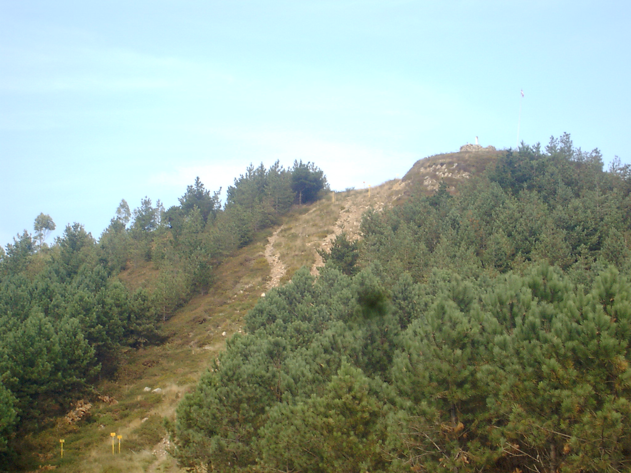 Gargola mendiko gas mendibidea hegoaldetik